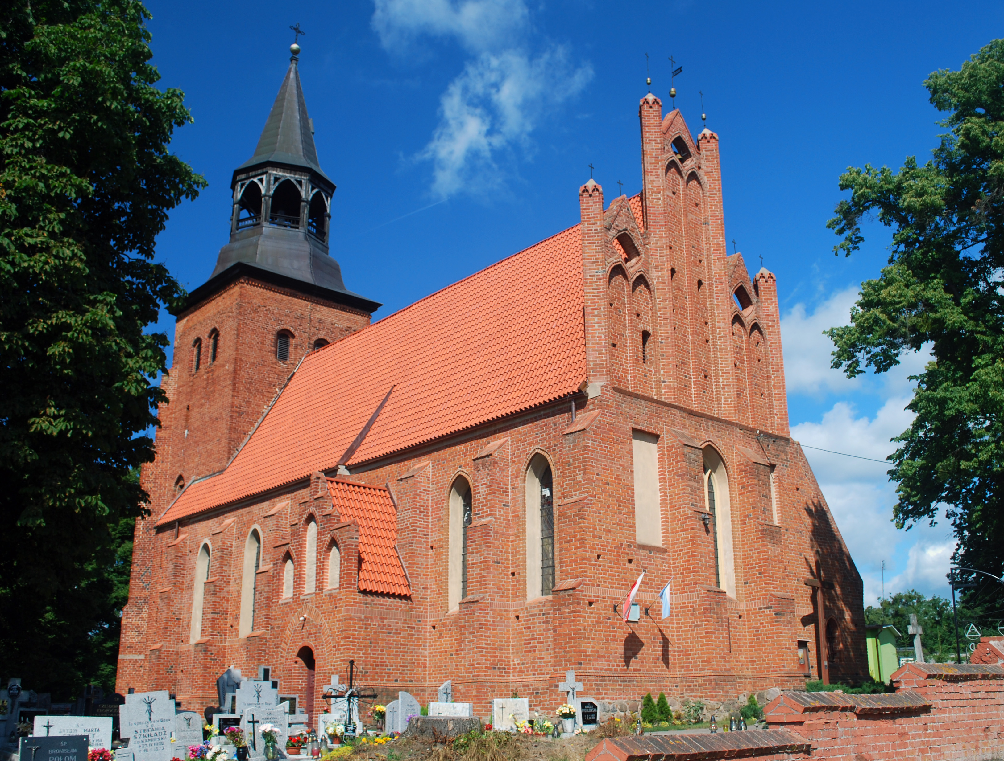 Kościół w Klonówce